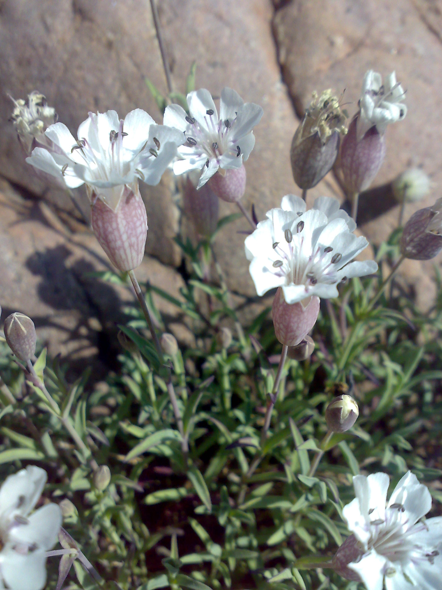 Silene uniflora